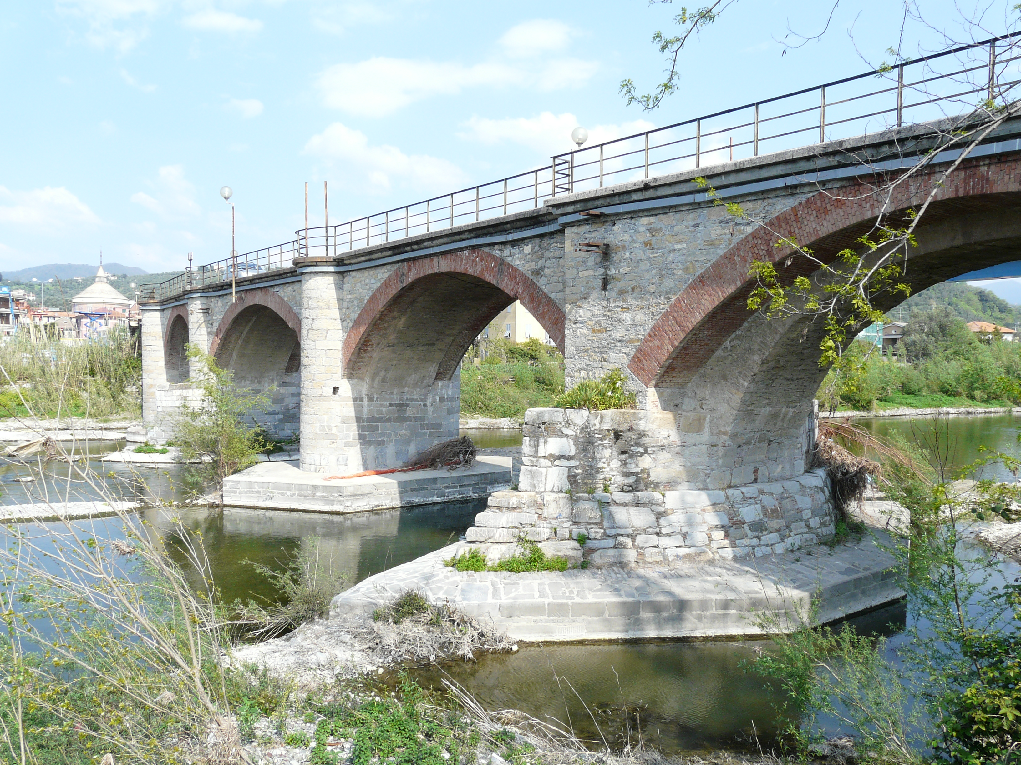 Ponte della Maddalena, lato sponda di Lavagna, Liguria, Italia